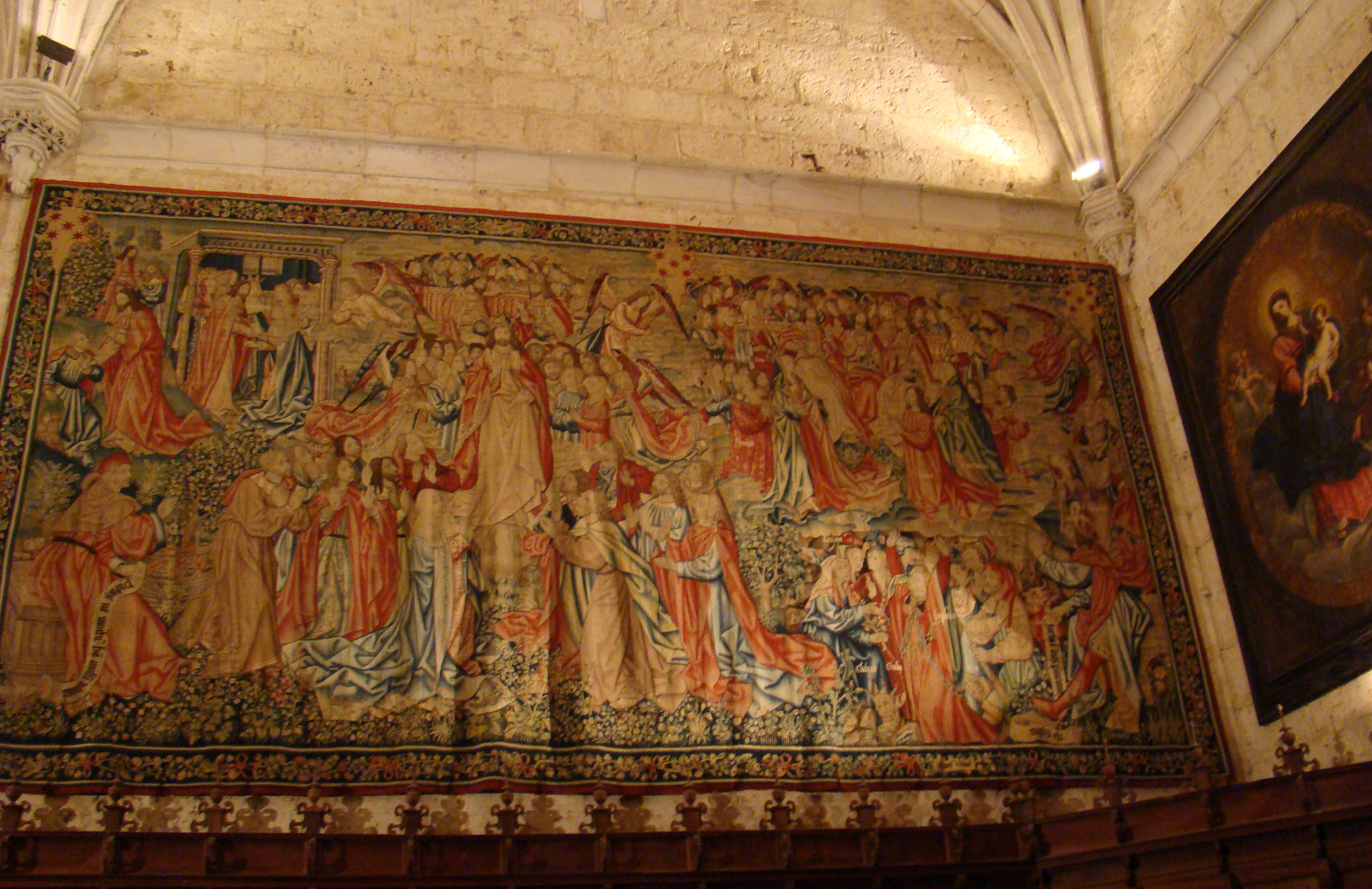 Pvtasne, mortvvs homo rvrsum vivat? Juxta est dies perdicionis. Parte de una colección de tapices de la catedral de Palencia (España). Fueron adquiridos en los Talleres de Bruselas y en los de Marche-Crétif, que era el tapicero de Francisco I de Francia. on tres series bien diferenciadas que siguen ciclos narrativos distintos, cuyos donantes fueron el obispo Juan Rodríguez de Fonseca y el Dr. Arroyo, canónigo de Palencia y magistral de Valladolid. El tapiz se conserva en la Sala Capitular de la catedral de san Antolín de Palencia, provincia de Palencia, (España).